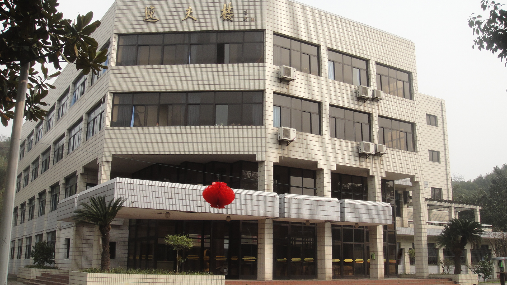 该逸夫楼坐落于蜀光中学功能路，目前用于蜀光中学初中部教学楼